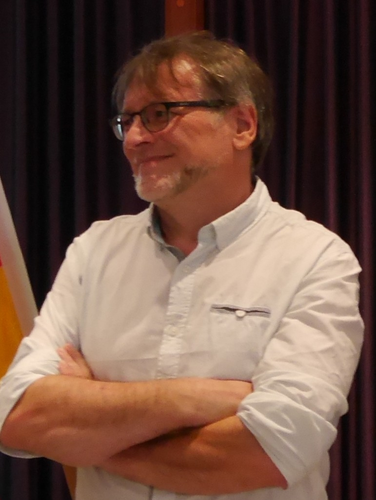 Uwe Pfenning, German Masters 2016 in Dresden.